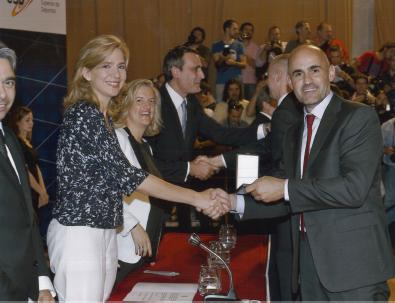 Medalla Real Orden del Mérito Deportivo, Ot Pi